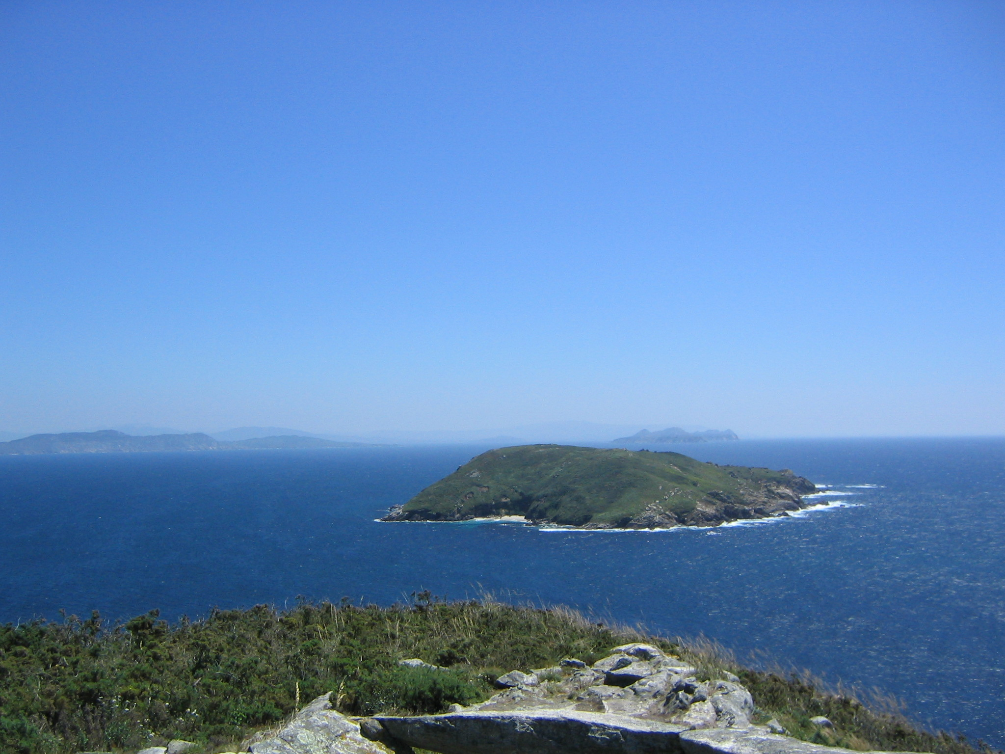 Isla de Ons. Vista desde Fedorentos de la isla Onza. Bueu Pontevedra.